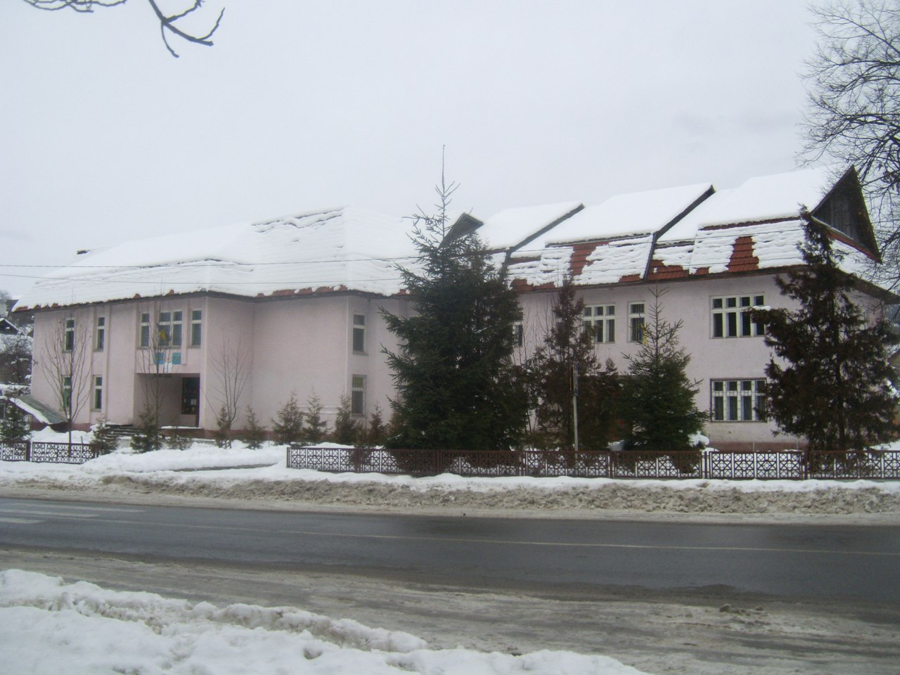 adminbudluh.jpg: Адміністративна будівля с. Луг (сільська рада, пошта, бібліотека, клуб дозвілля)